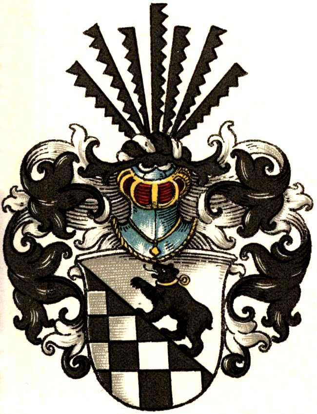 Stamm-Wappen II derer von Bar (Baer)